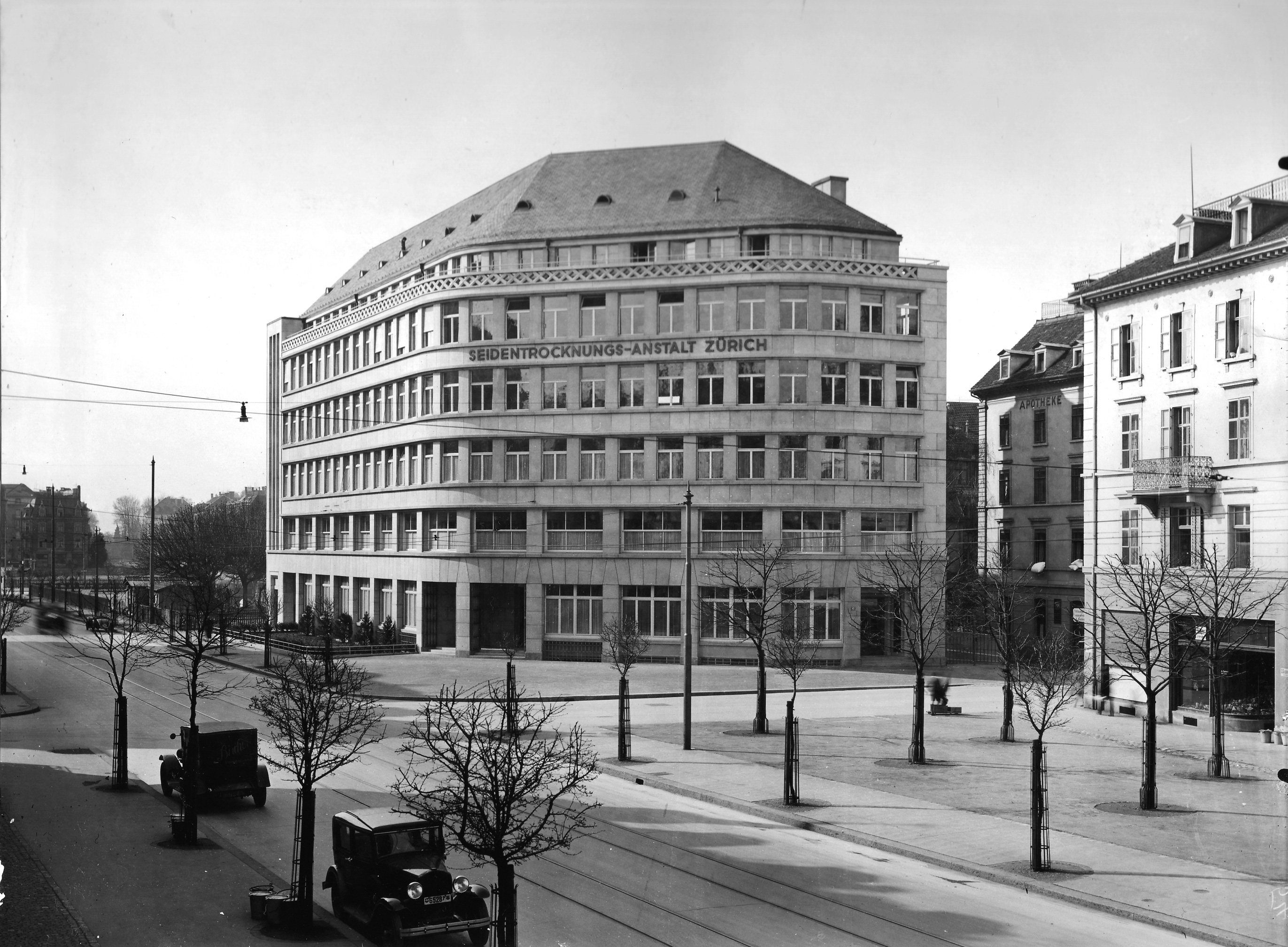 Bezug des Neubaus am heutigen Firmendomizil, Gotthardstrasse 61, Zürich